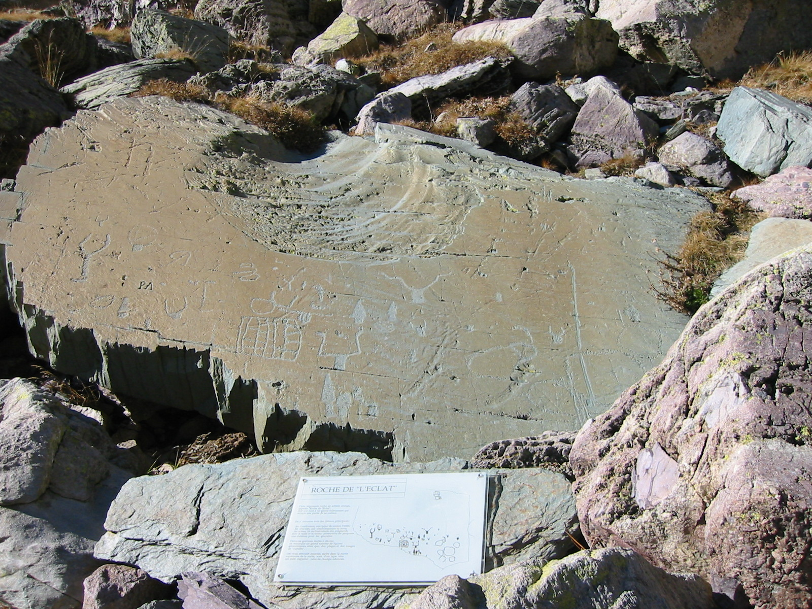 Vue de la Roche de "l'éclat", stèle couverte de gravures rupestres de la Vallée des Merveilles. Cette photo a été prise dans la Vallée des Merveilles lors d'une randonnée en famille. Ces gravures datent de l'age du bronze et/ou du cuivre. Bien que relativement difficile d'accès (compter 7 à 8 heures de randonnée aller-retour), certaines de ces stèles sont vandalisées (voir l'inscription "PA" en bas à gauche). Pour cette raison il est interdit de quitter le sentier (GR52) sans être accompagné d'un guide agrée. Licences Georges DICK 2005 et .